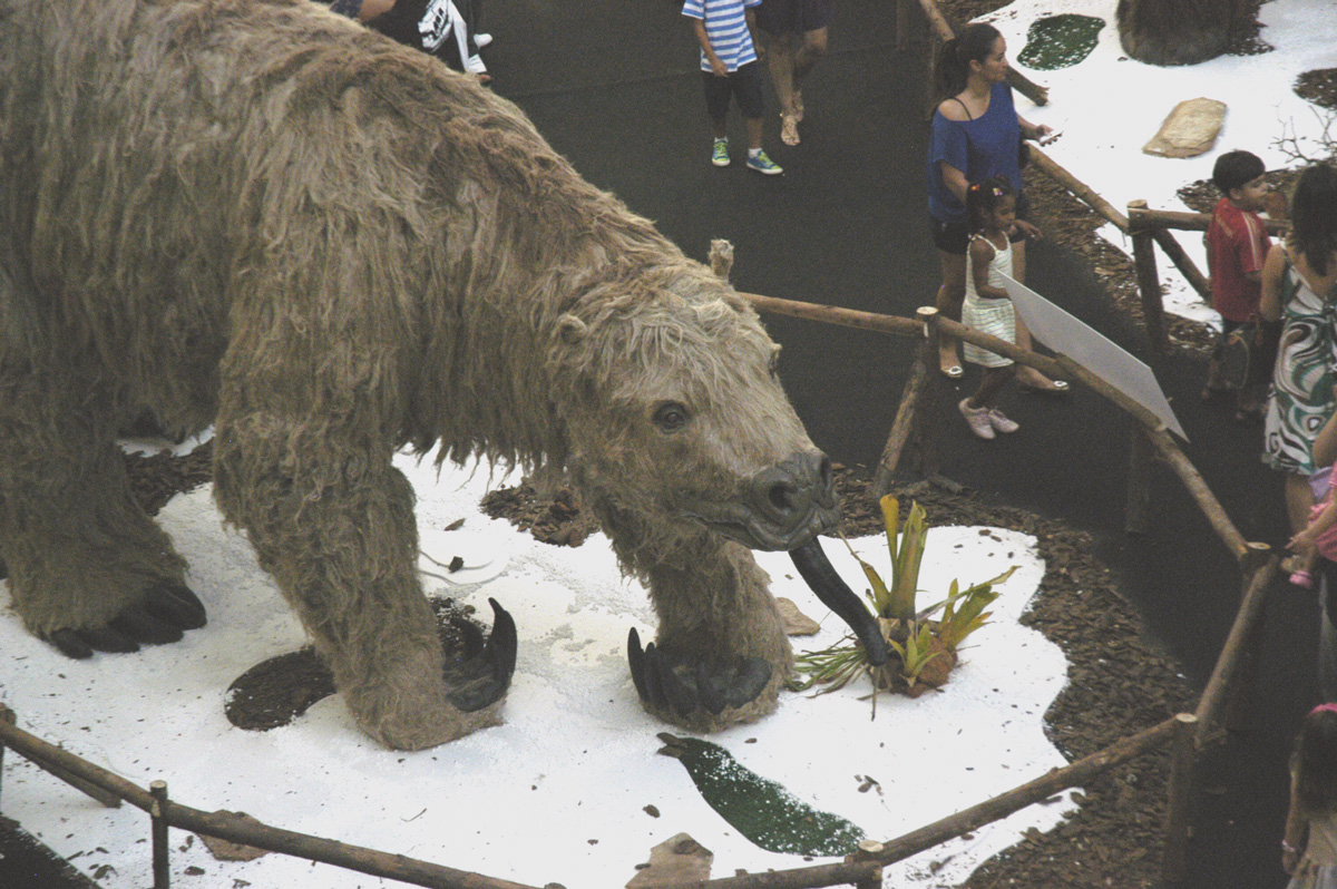 Megatherium, Modelo - Museu de História Natural de Pilsen, da República Tcheca; Exposição “Gigantes da Era do Gelo”, Salvador, Bahia, Brasil, agosto, 2012